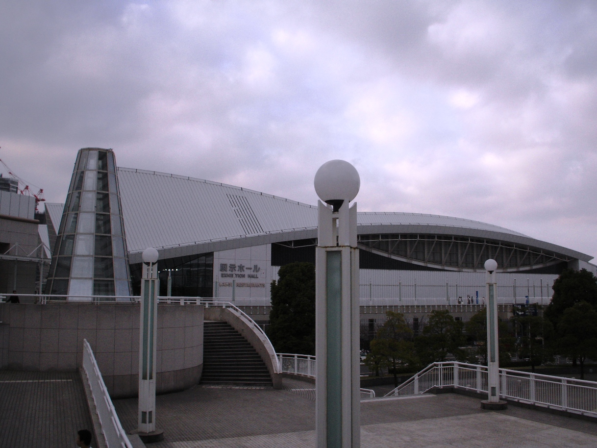 パシフィコ横浜展示ホール